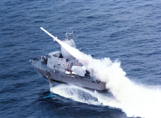 ירי טיל הרפון מאח"י שמרית